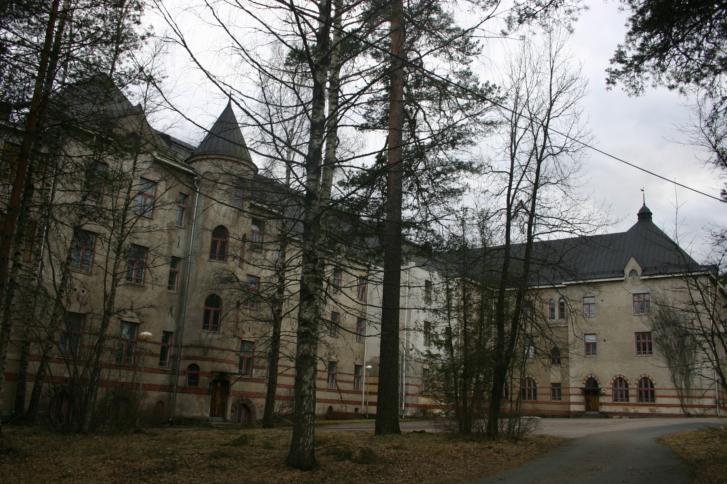 Röykän sairaalan piha ja päärakennus.